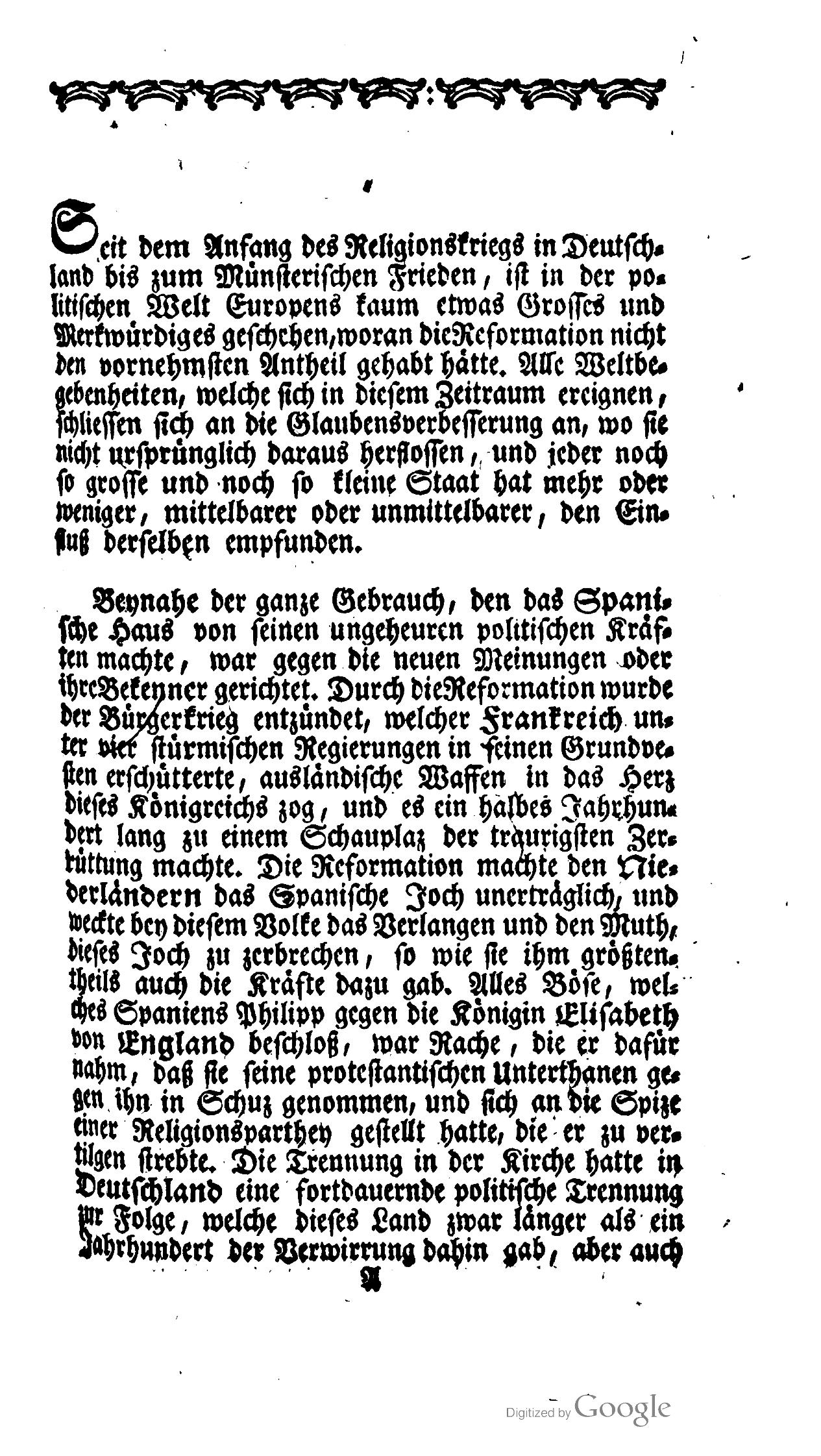 Geschichte des dreyßigjährigen Kriegs